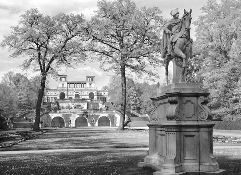 Potsdam.- Sanssouci, Orangerie